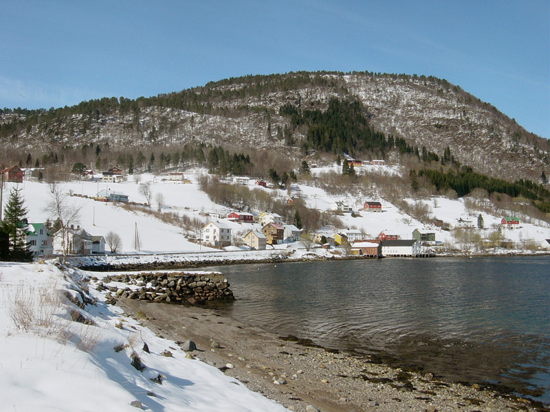 Gjemnes and Flemma